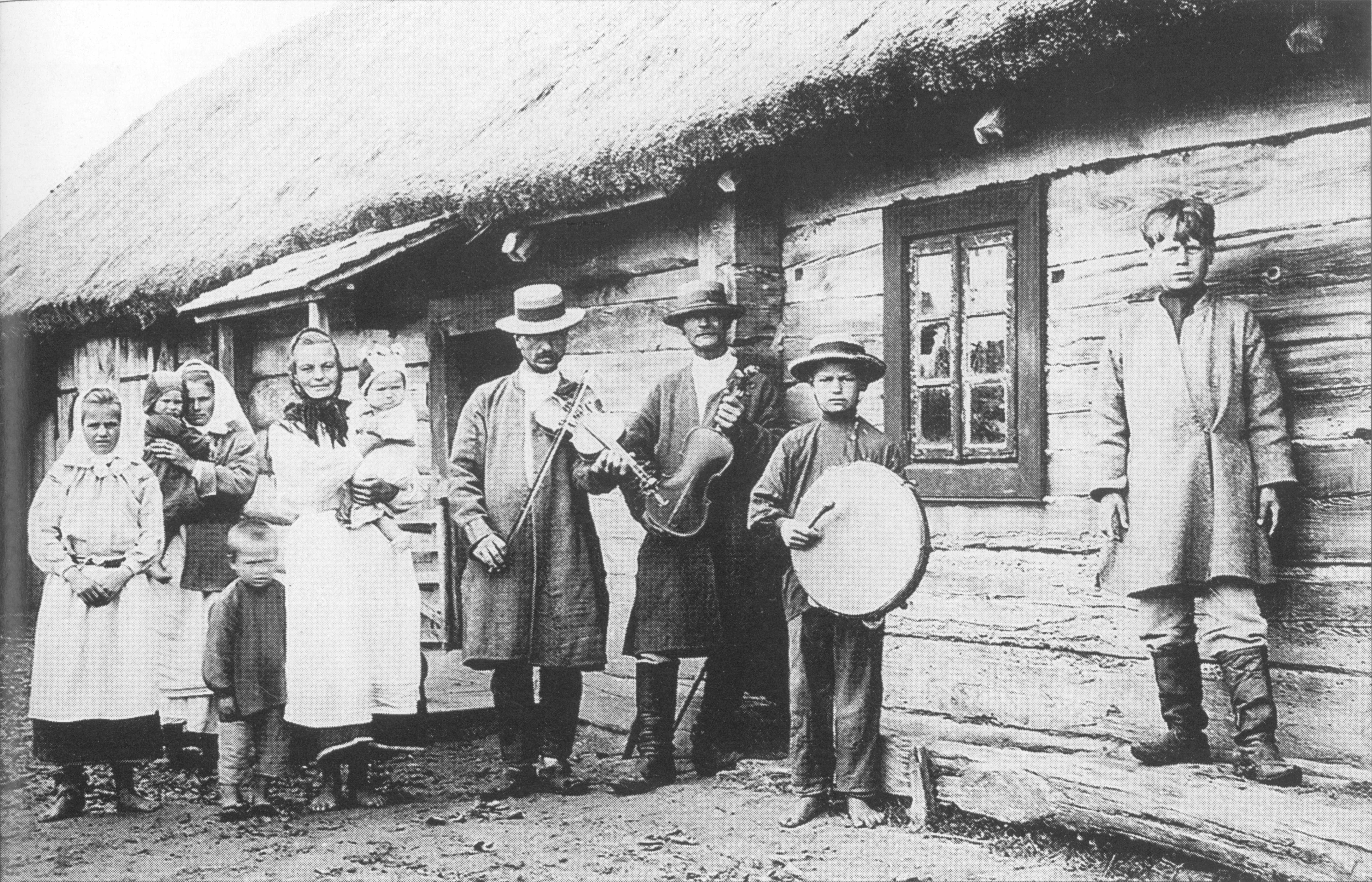 Lachowiccy muzycy, powiat słucki guberni mińskiej Imperium Rosyjskiego (zabór rosyjski), 1913 rok